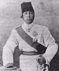 Abdelaziz, Sultan of Morocco (1878-1943)